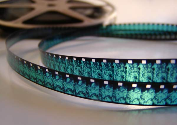 Bobina de pel.lícula on es poden veure els fotogrames